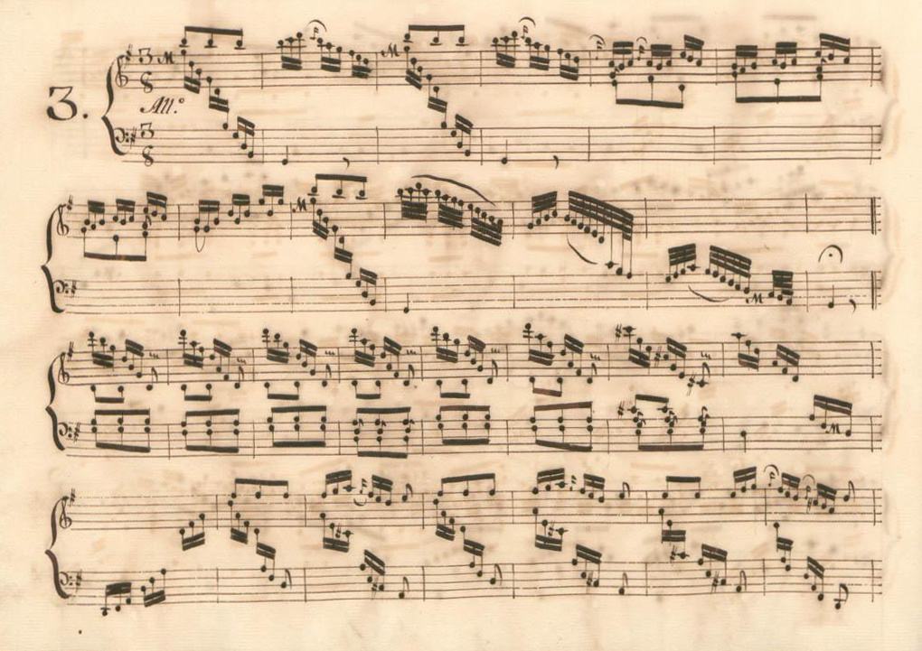 La sonate K. 124, telle qu'elle se présente dans le manuscrit de Parme, volume II no. 3.